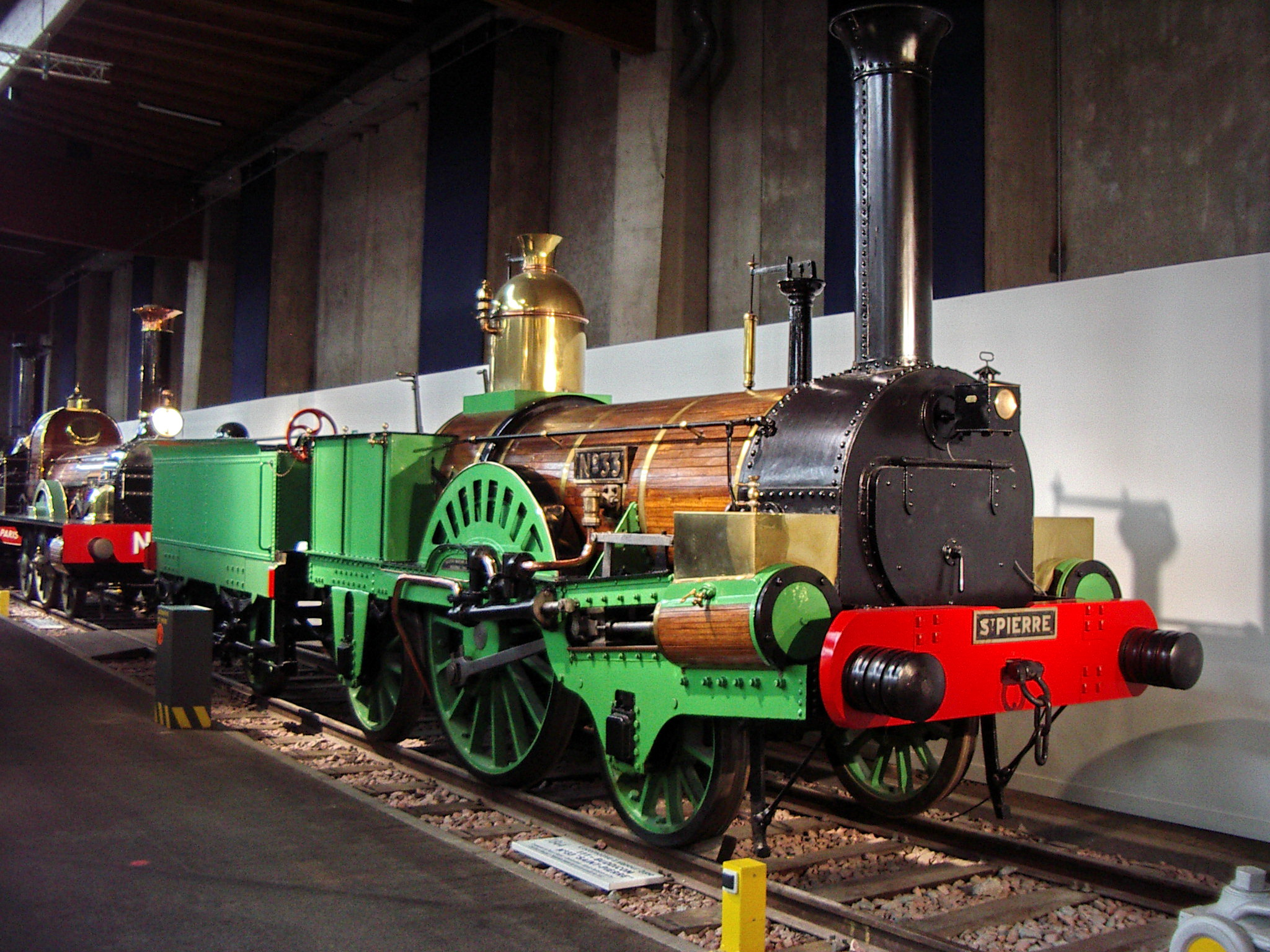 Locomotive type 111-Buddicom N°33 "St Pierre", compagnie de Paris à Rouen. Constructeur : Allcard-Buddicom & Cie. Photographié à la cité du train à Mulhouse.